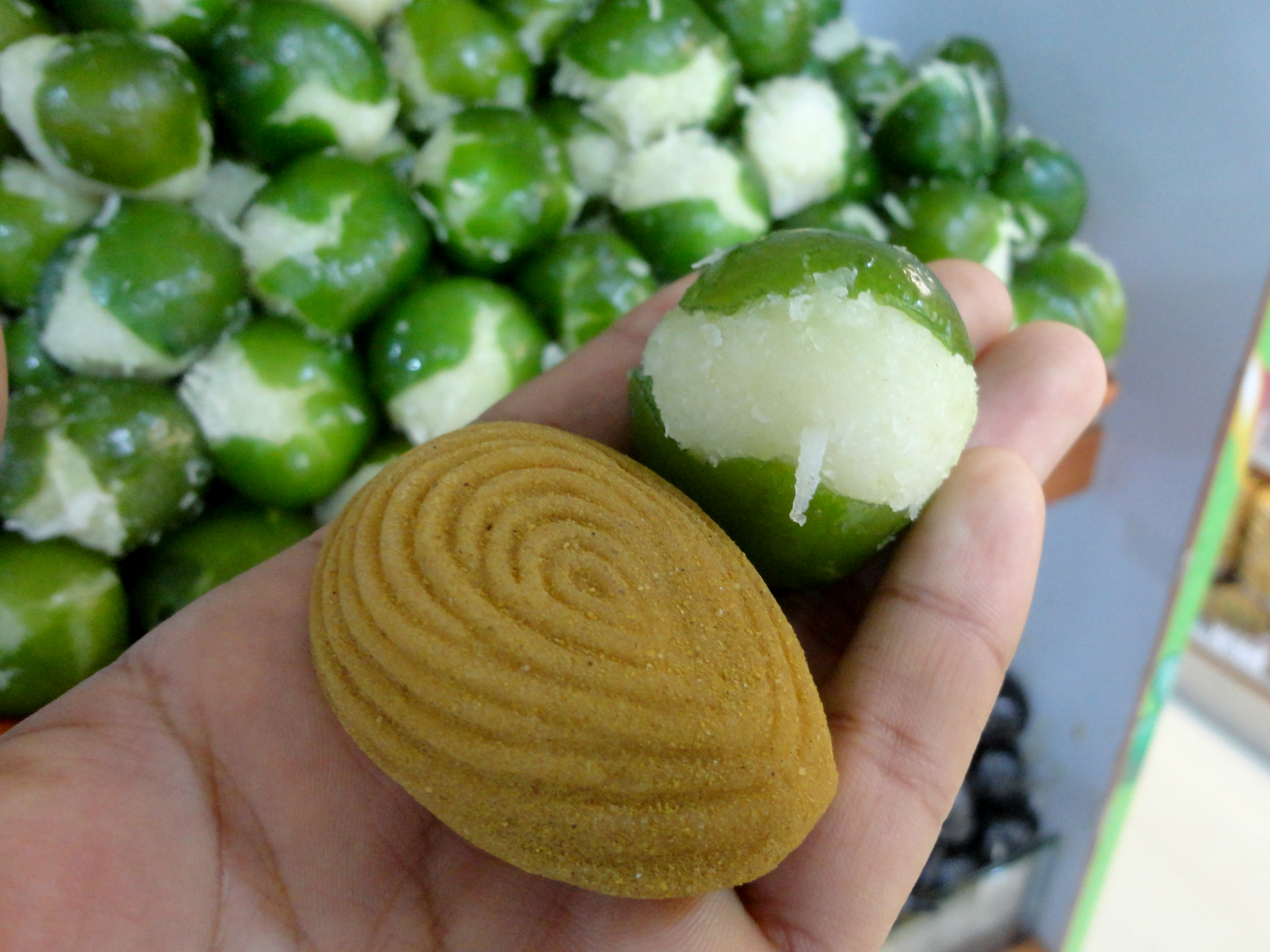 Dulces mexicanos, huesito y limón relleno de coco. Tienda de dulces típicos en Toluca, Estado de México.